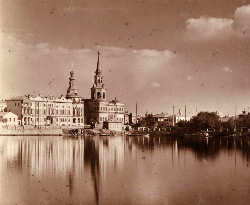 Городской пруд, Екатерининский собор и дом Севастьянова